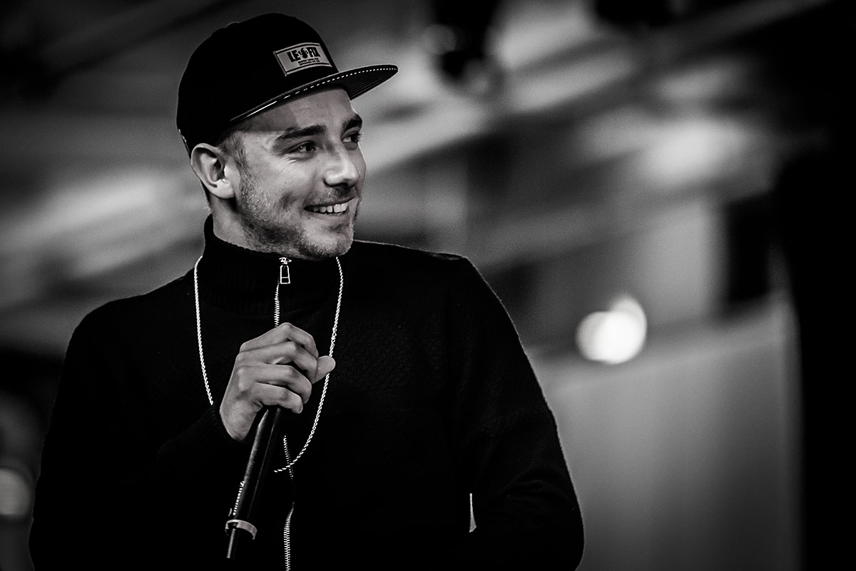 TopGunn til Copenhagen Dancehall 5/4-14